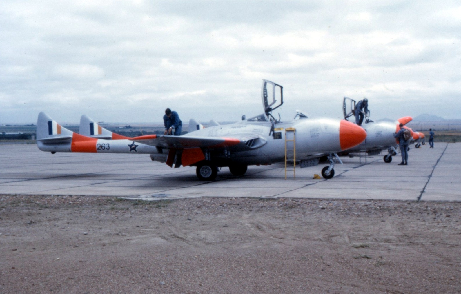 Vampire T.55 no. 263, AFB Pietersburg